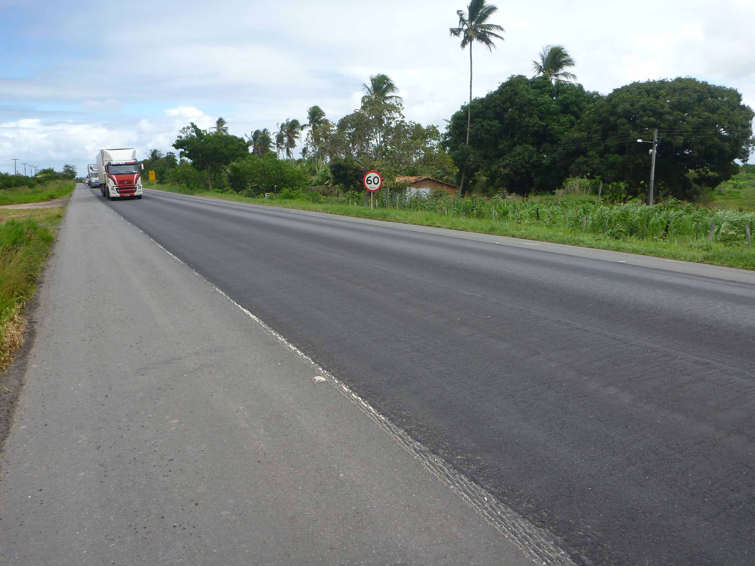 La BR-101 en el estado brasileño de Sergipe.